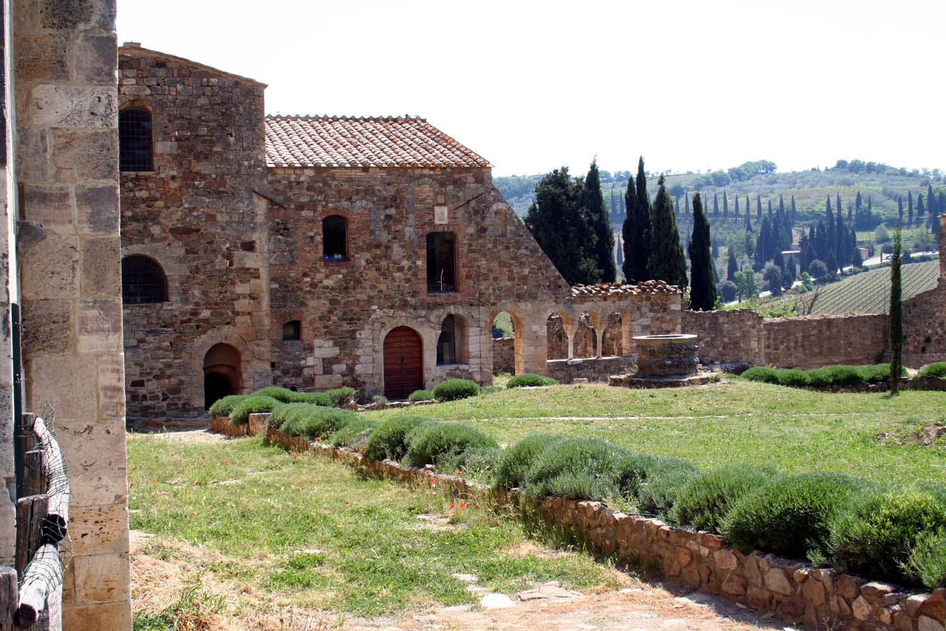 Sant Antimo: alter Kreuzgang